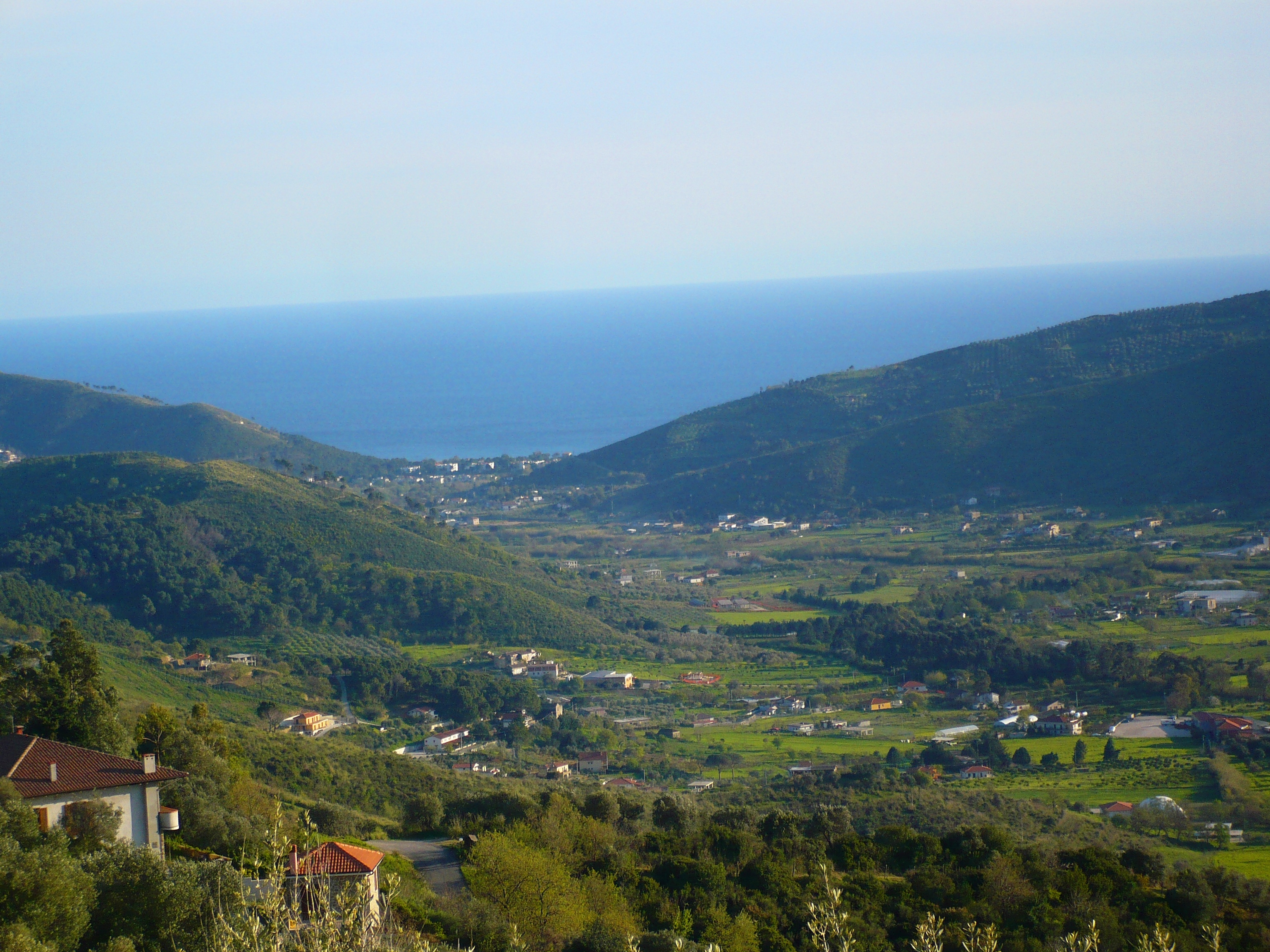 La frazione Annunziata di castellabate